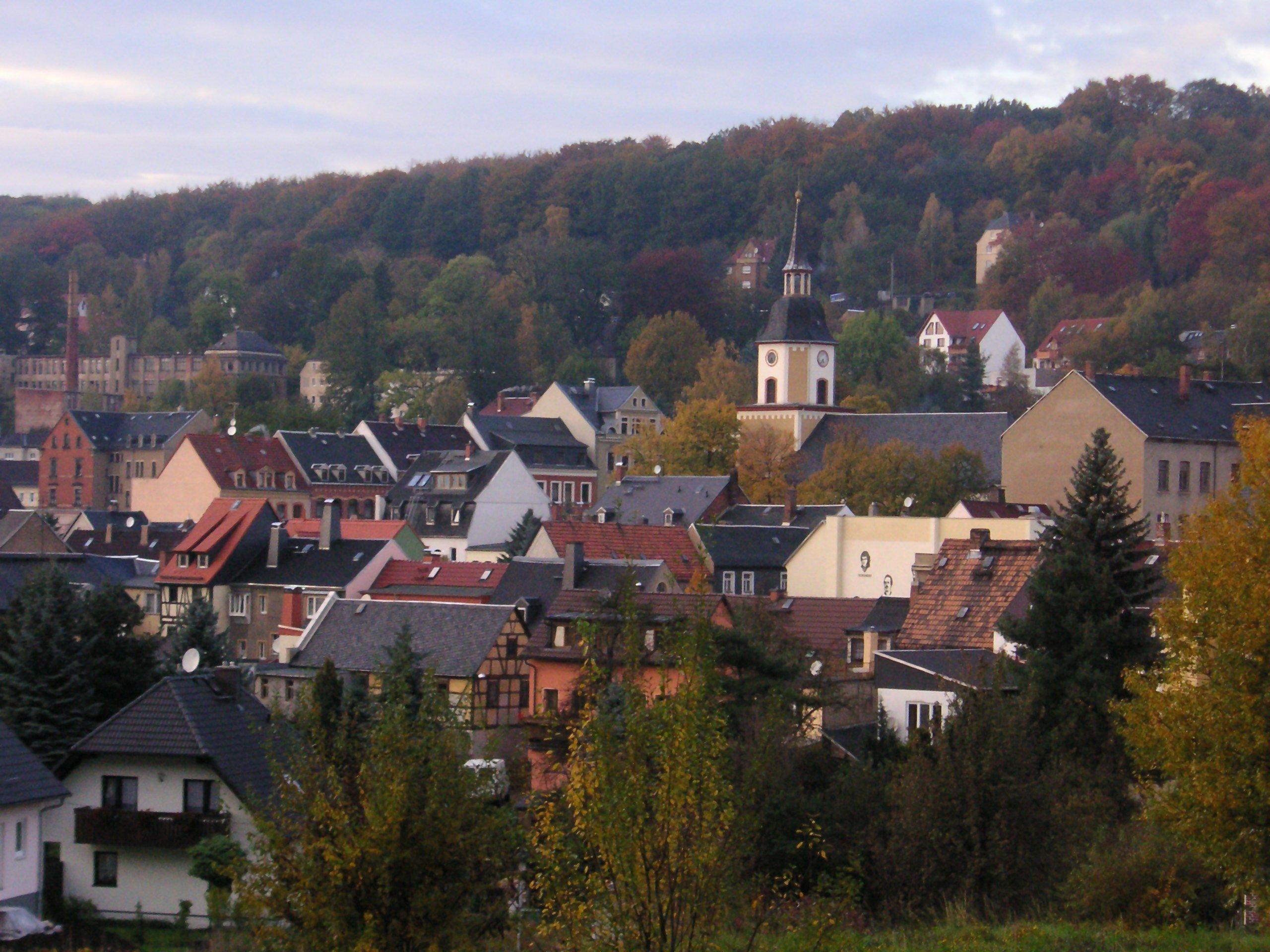 Blick auf Hohenstein-Ernstthal. Autor / Quelle: Selbst fotografiert im Herbst 2005. Lizenz: Keine Rechte vorbehalten. (Gemeinfrei)